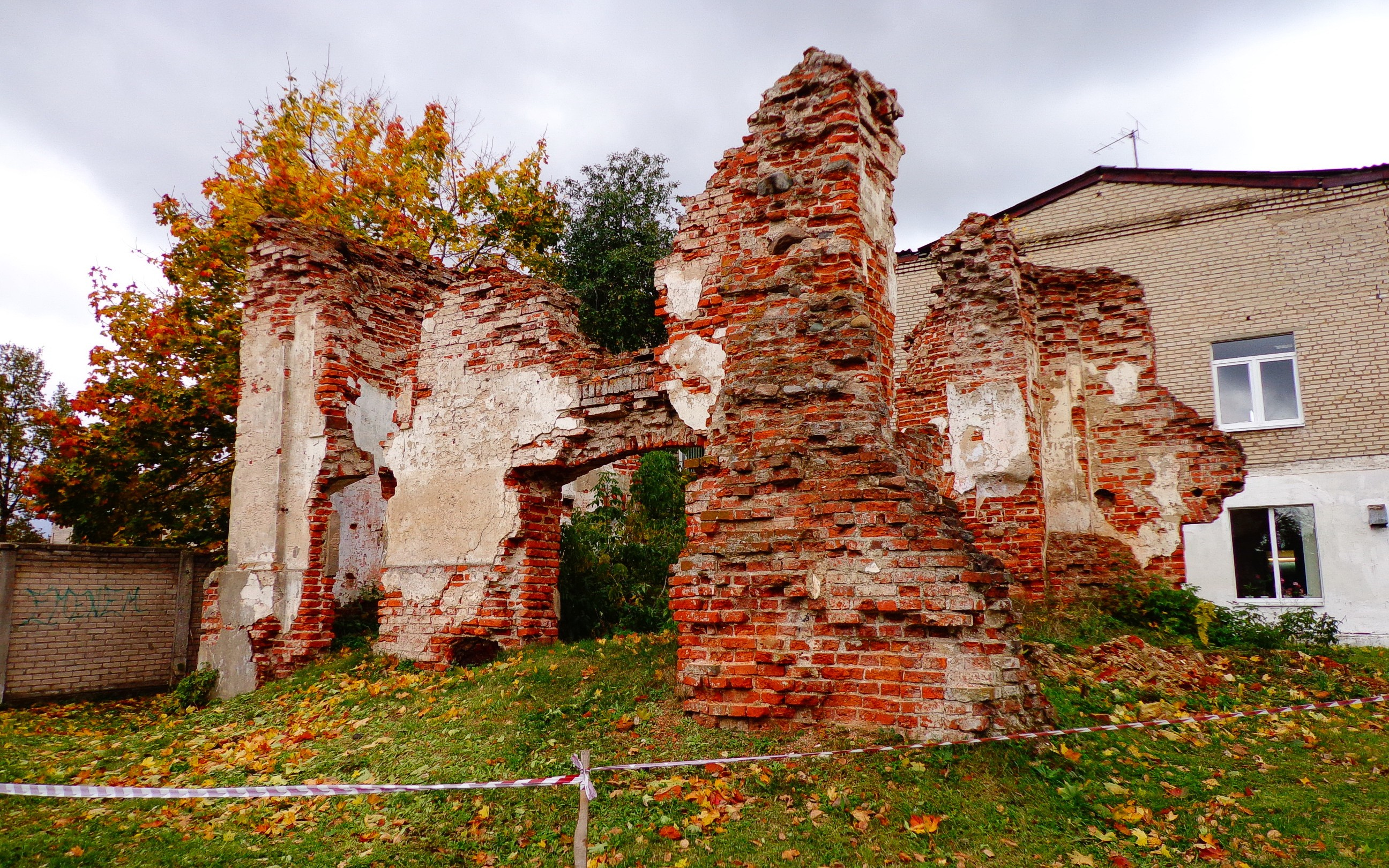 Беларуская (тарашкевіца): Полацак. Руіны касьцёлу кляштара бэрнардынцаў.